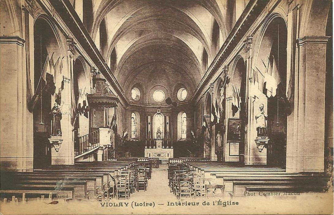 Intérieur de l'église de Violay. Date inconnue